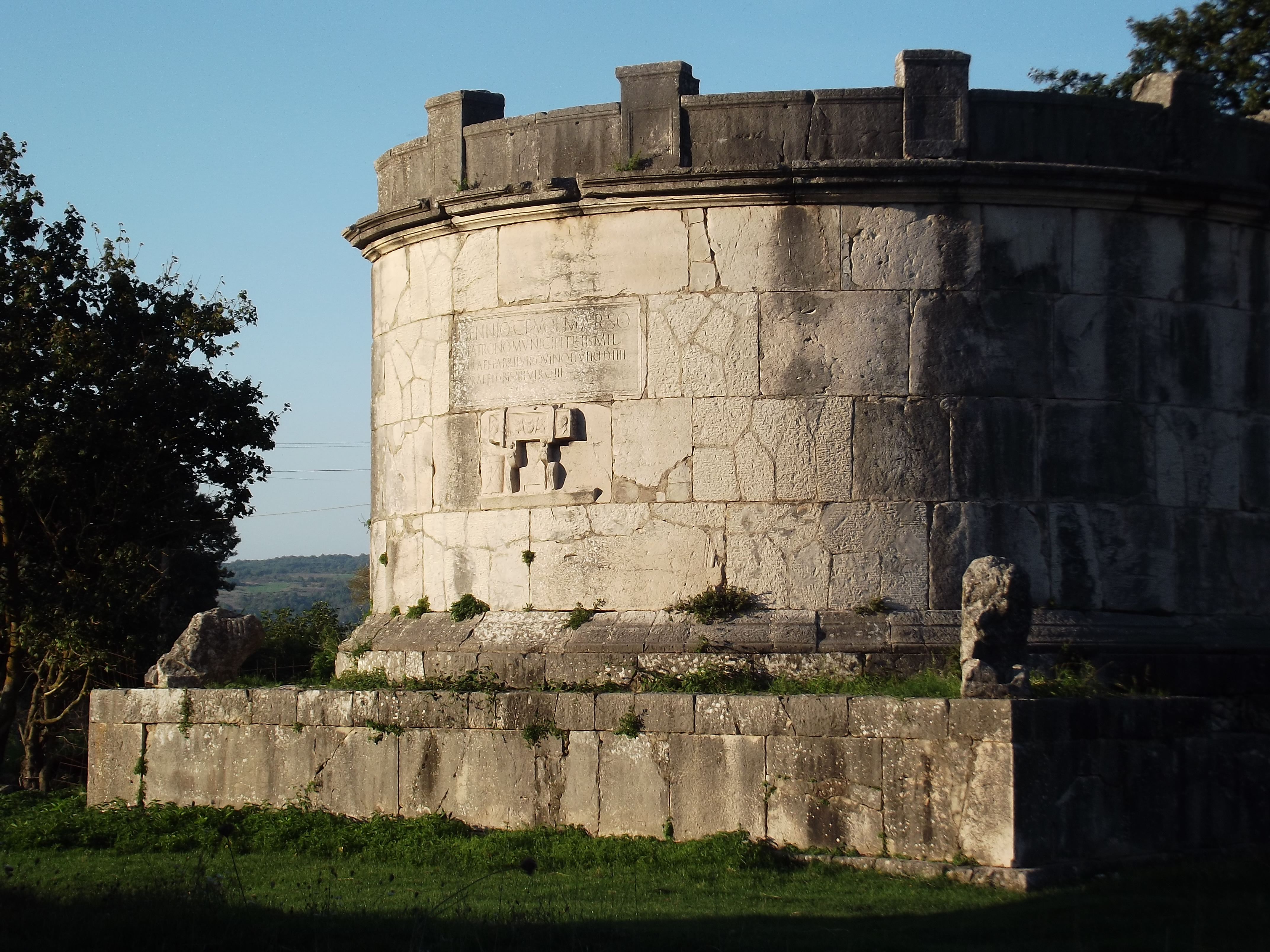 Area archeologica - MIBAC This is a photo of a monument which is part of cultural heritage of Italy.